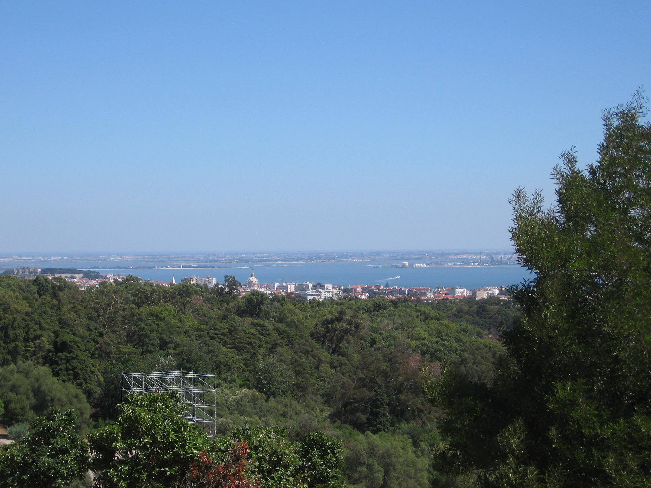 Parque de Monsanto, Lisboa, Portugal